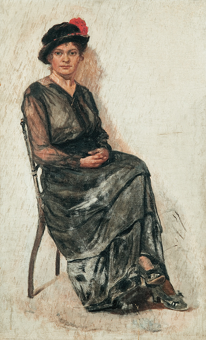 Portret młodej damy